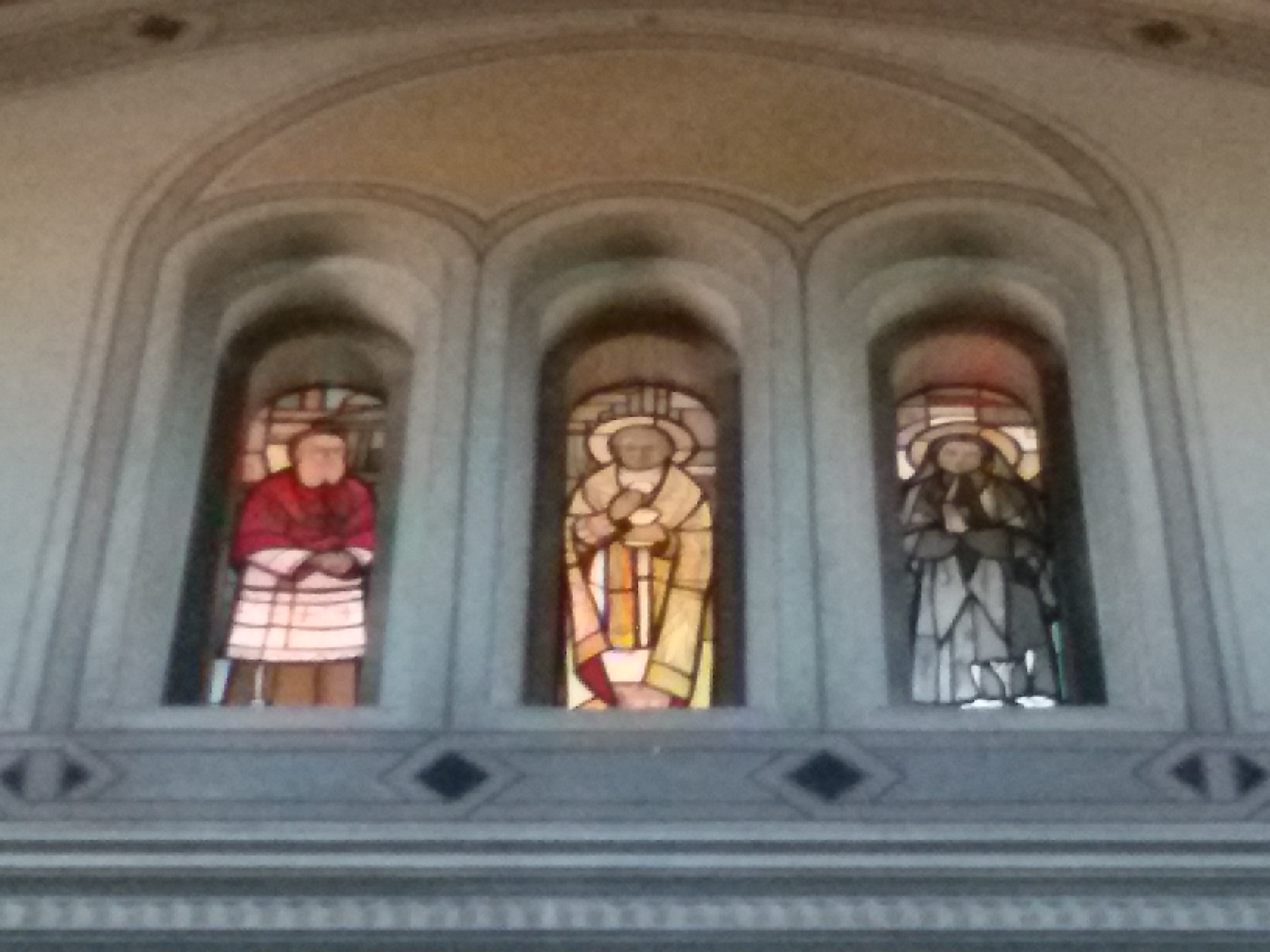 Chiesa di Santa Cristina Vergine e martire del Tiverone